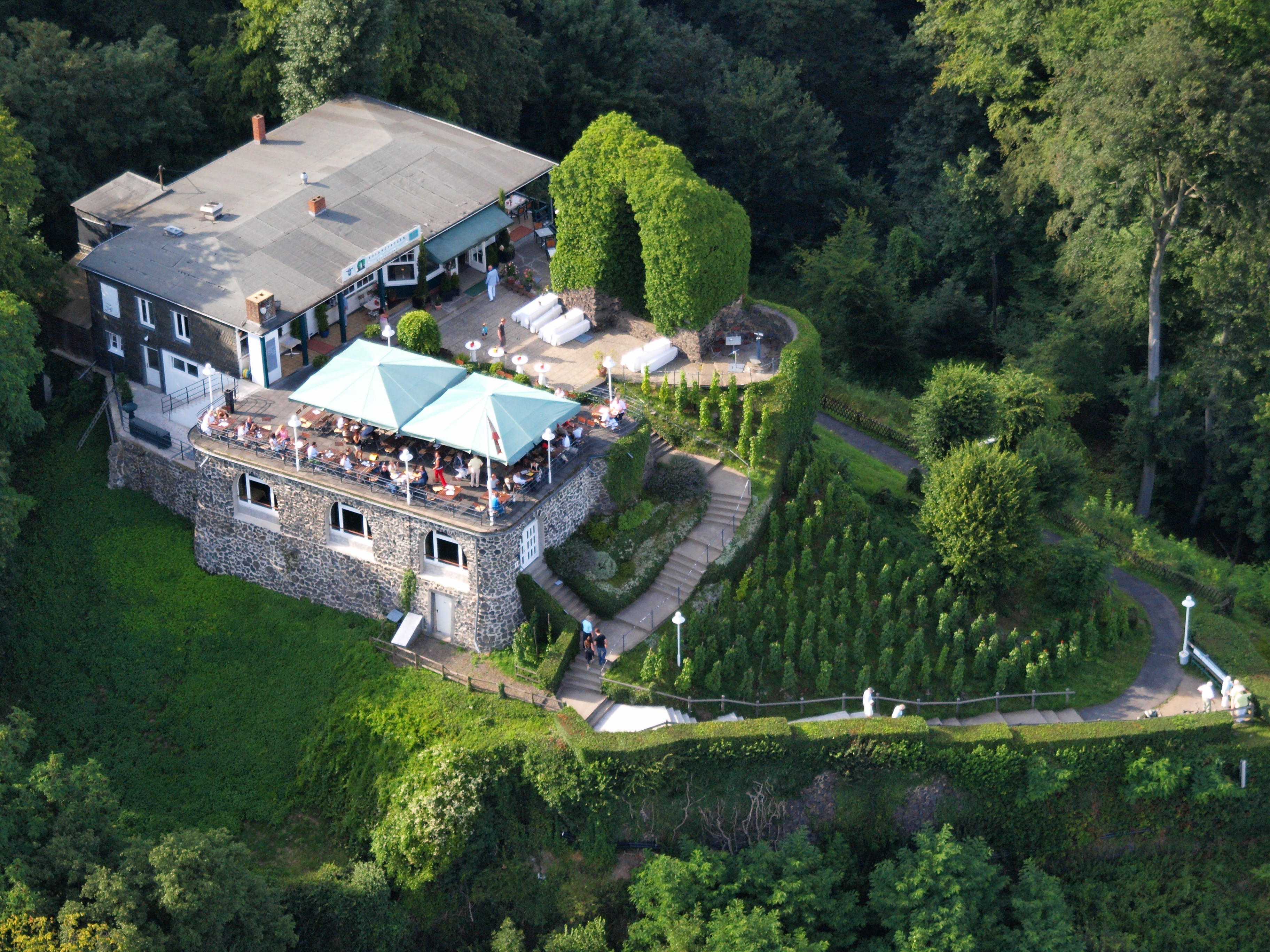 Rolandsbogen, Rolandswerth